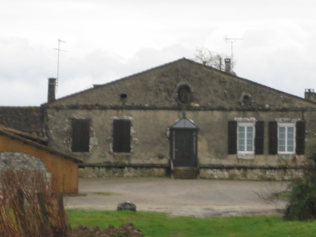 Belle ferme XVII-XVIII dans la campagne Lieu : Colombet Soumensac Lot et Garonne Prise de vue : novembre 2006 Auteur : Jacques David